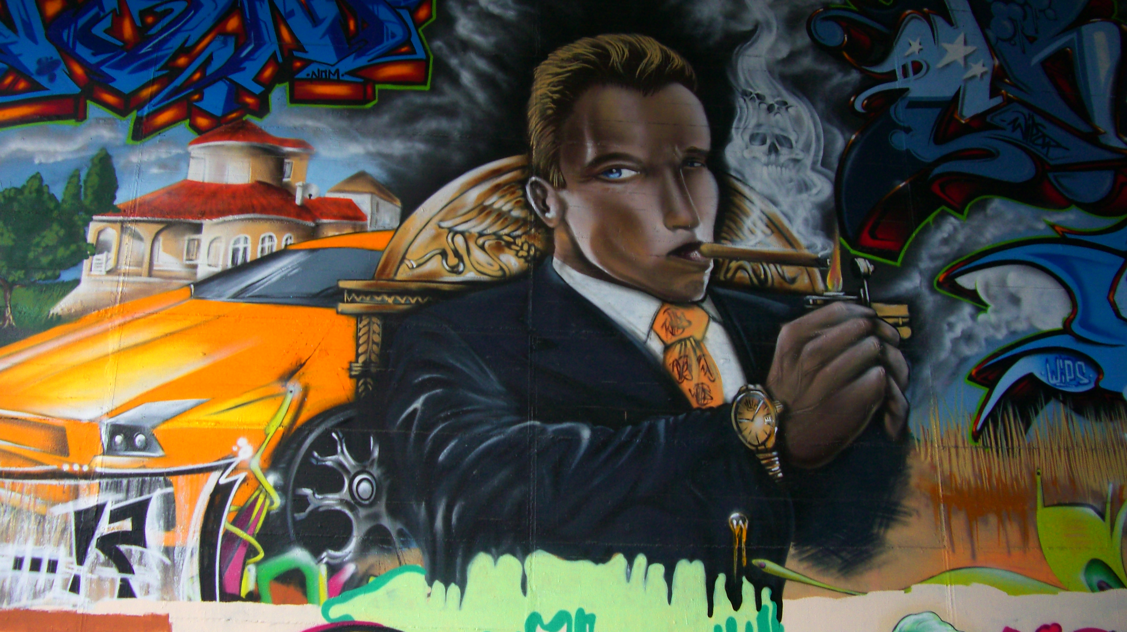 Gouvernator